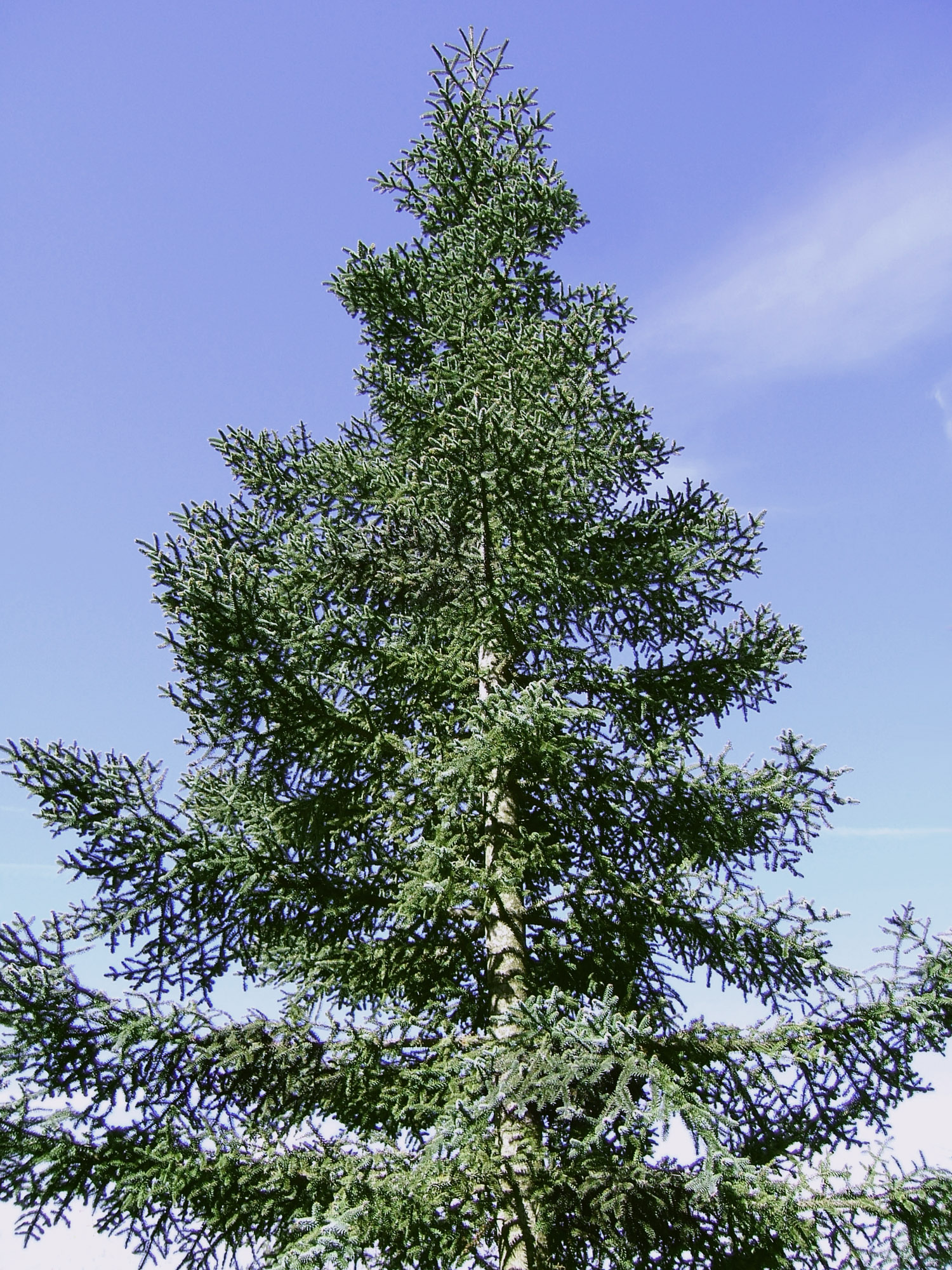 Abies procera glauca